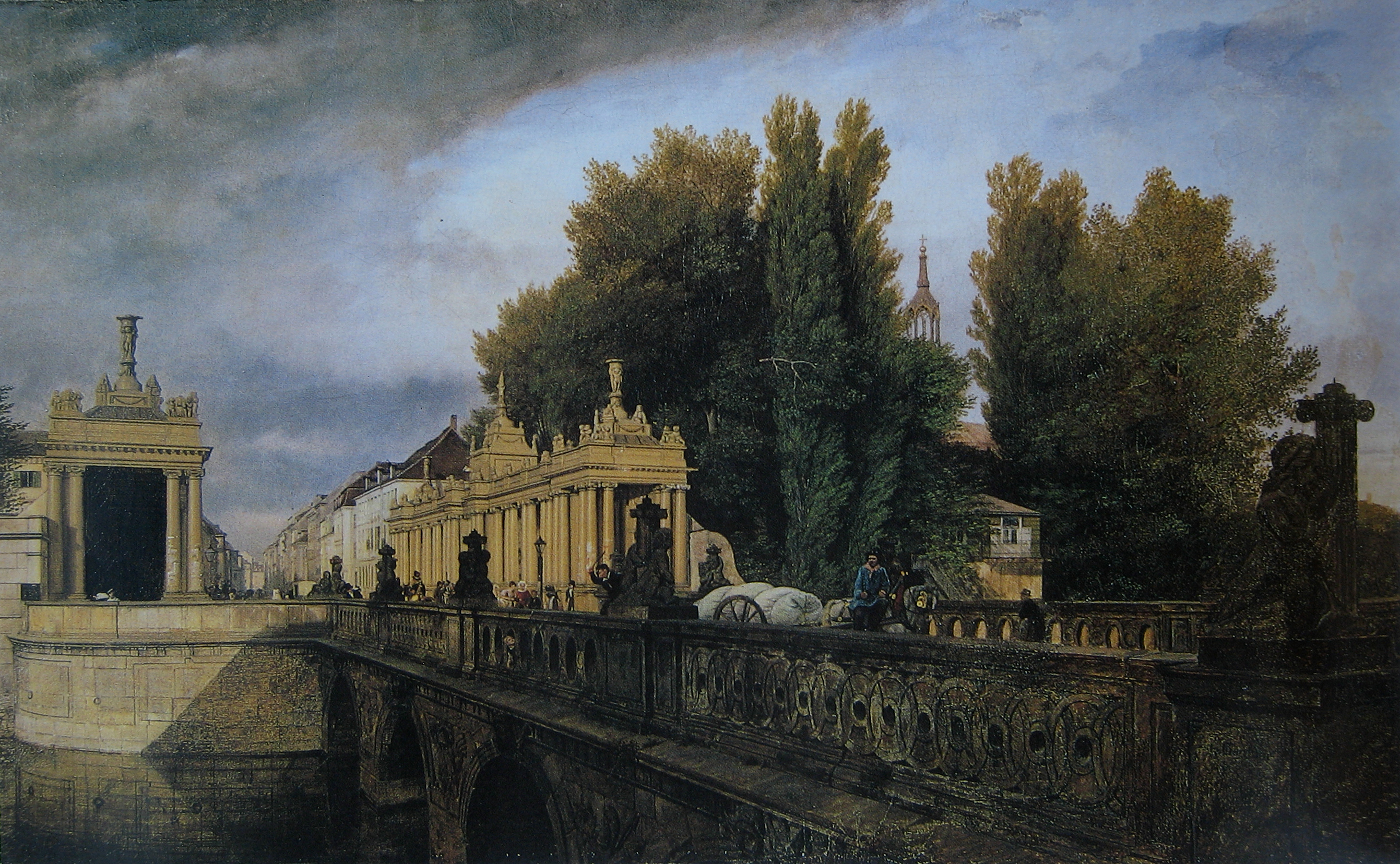 Königsbrücke und Königskolonnaden in Berlin/Deutschland